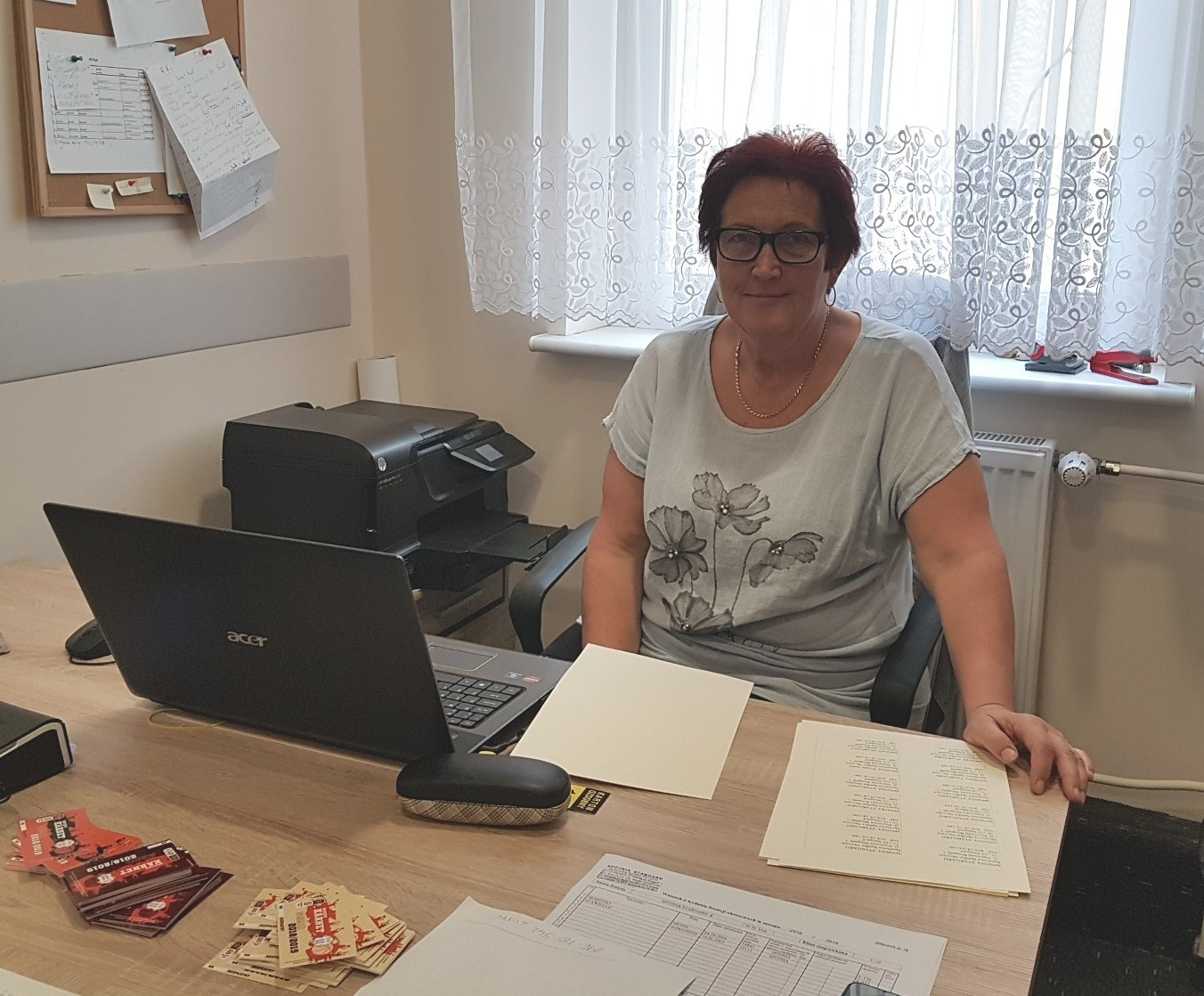 Elżbieta Paterkowska